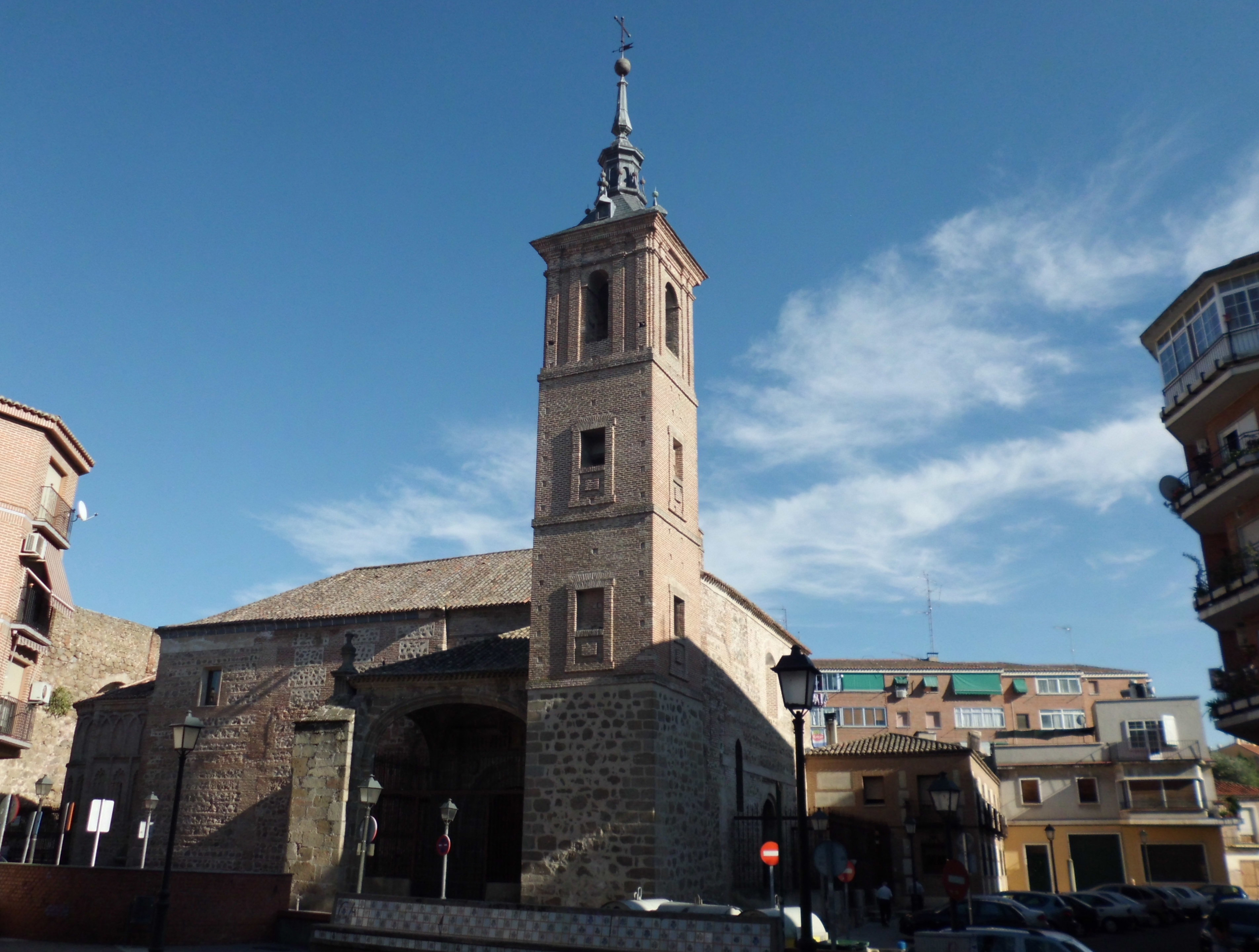 Iglesia de El Salvador en Talavera de la Reina